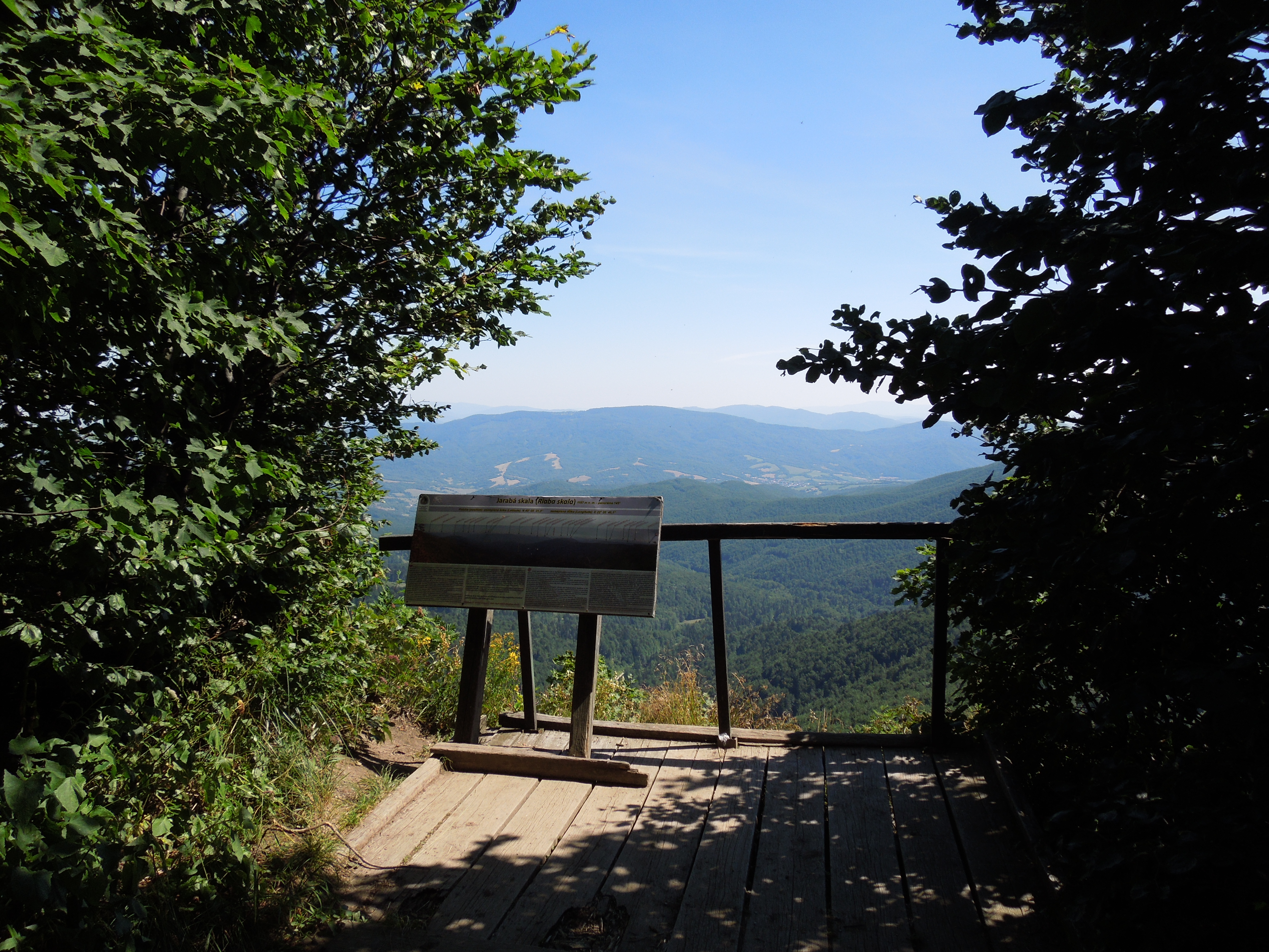 Jarabá skala vyhliadka na skalnom brale